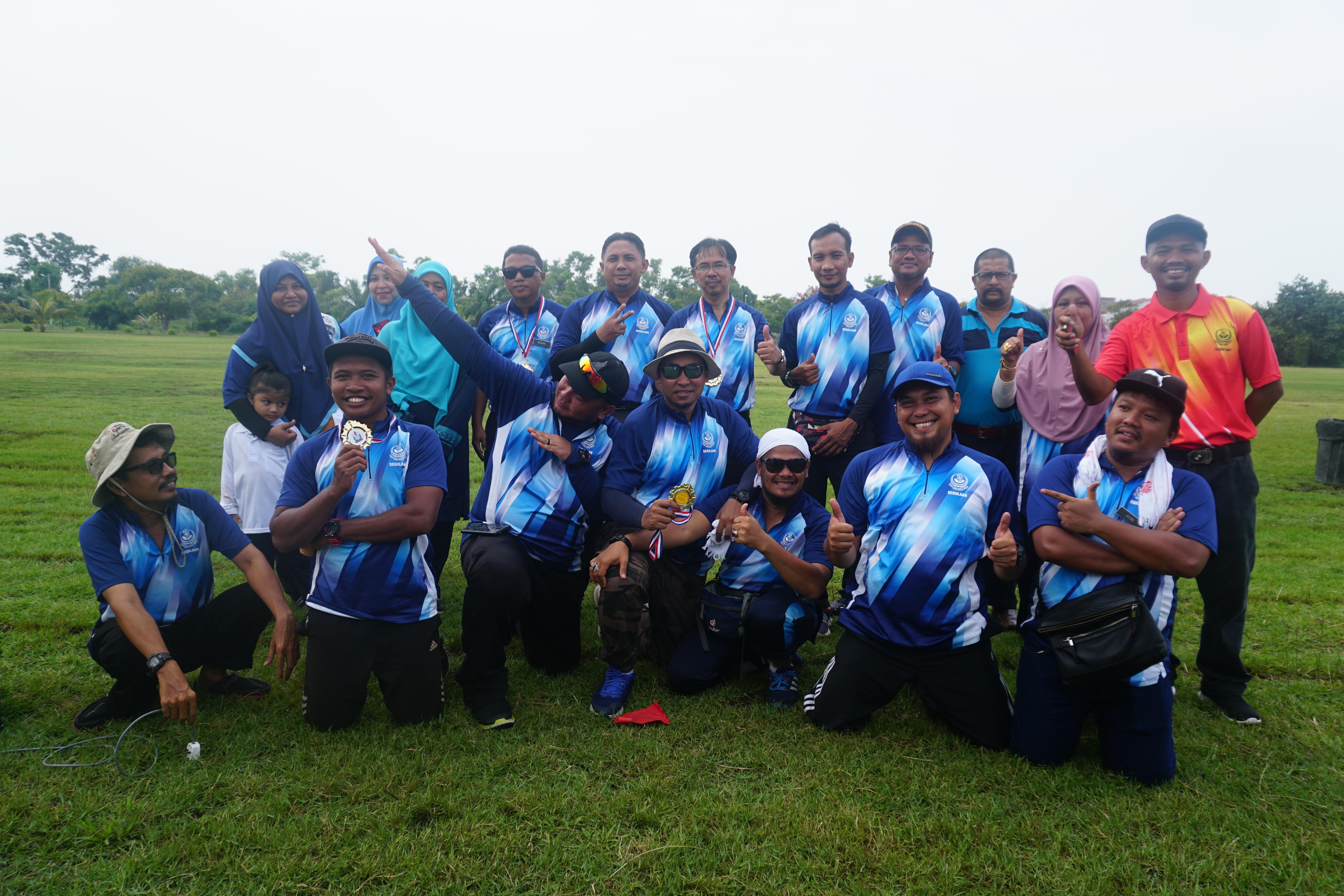 Group photo AJK Sukan 2019